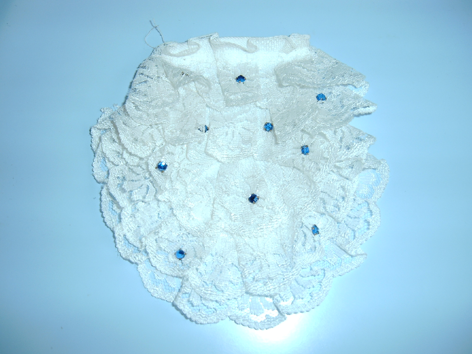 Spitzenjabot